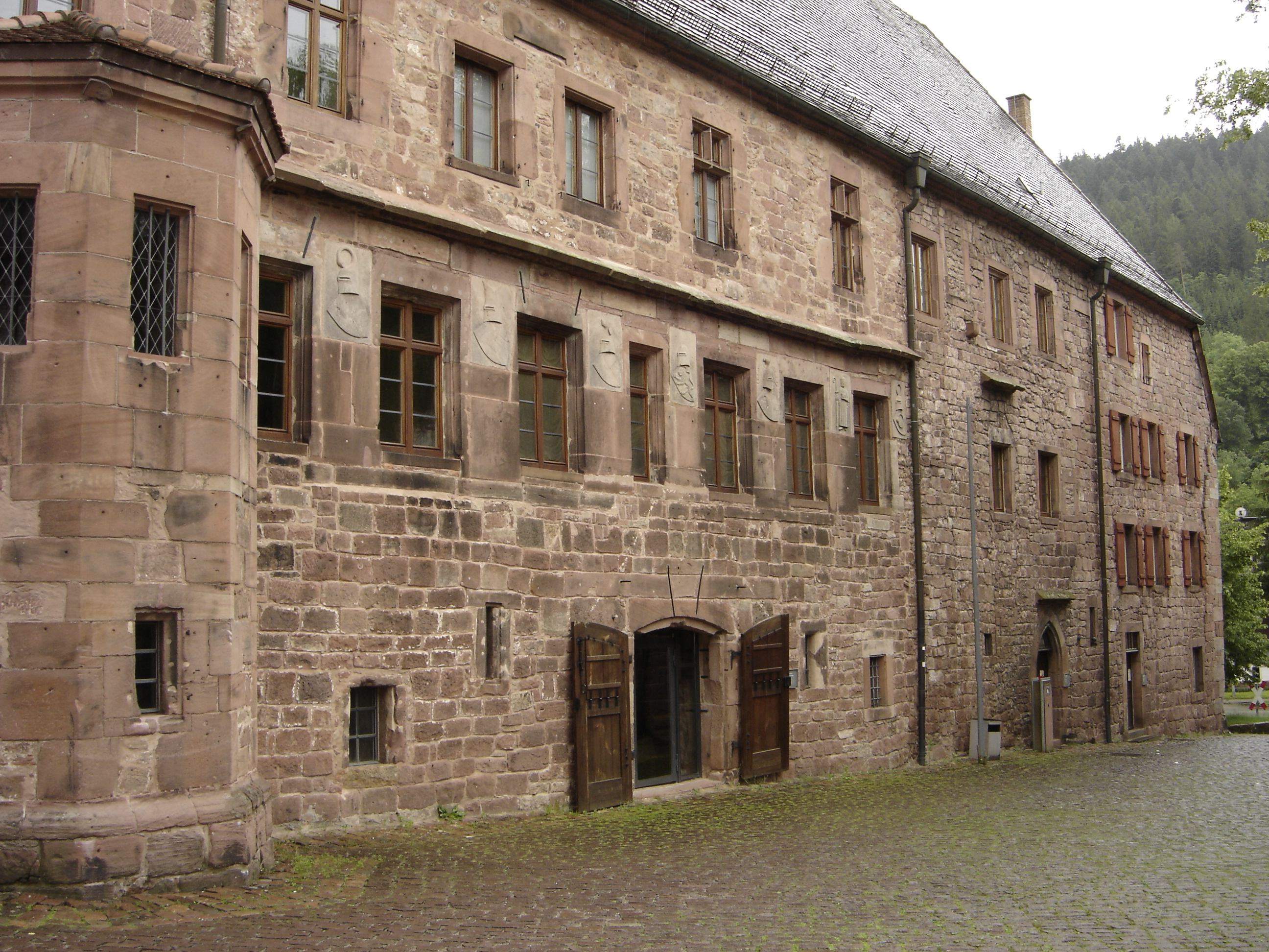 Das Kloster in Alpirsbach